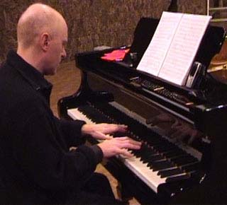 Stephane Meer, compositeur de musique de film.